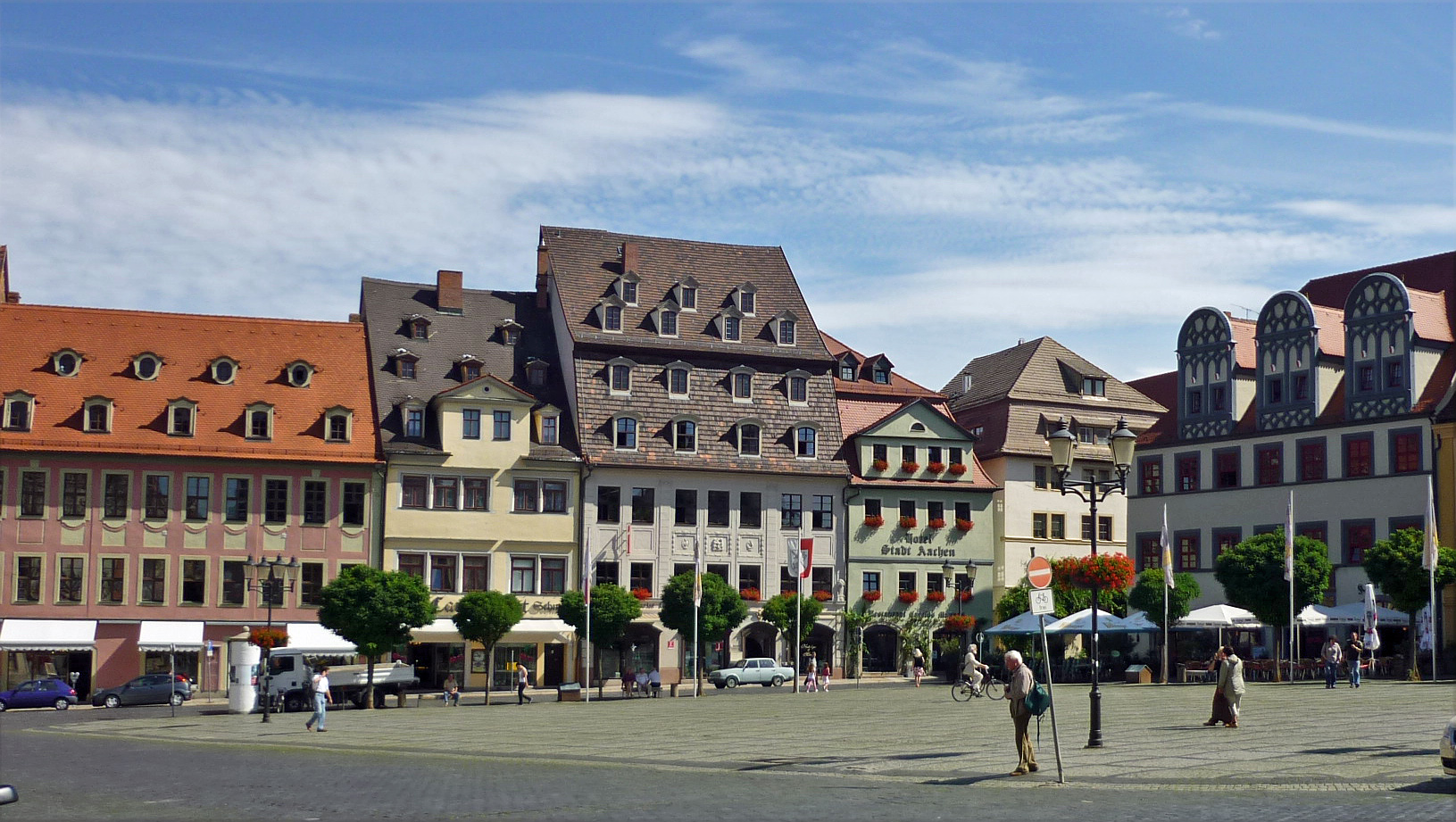 Marktplatz in Naumburg (Saale)